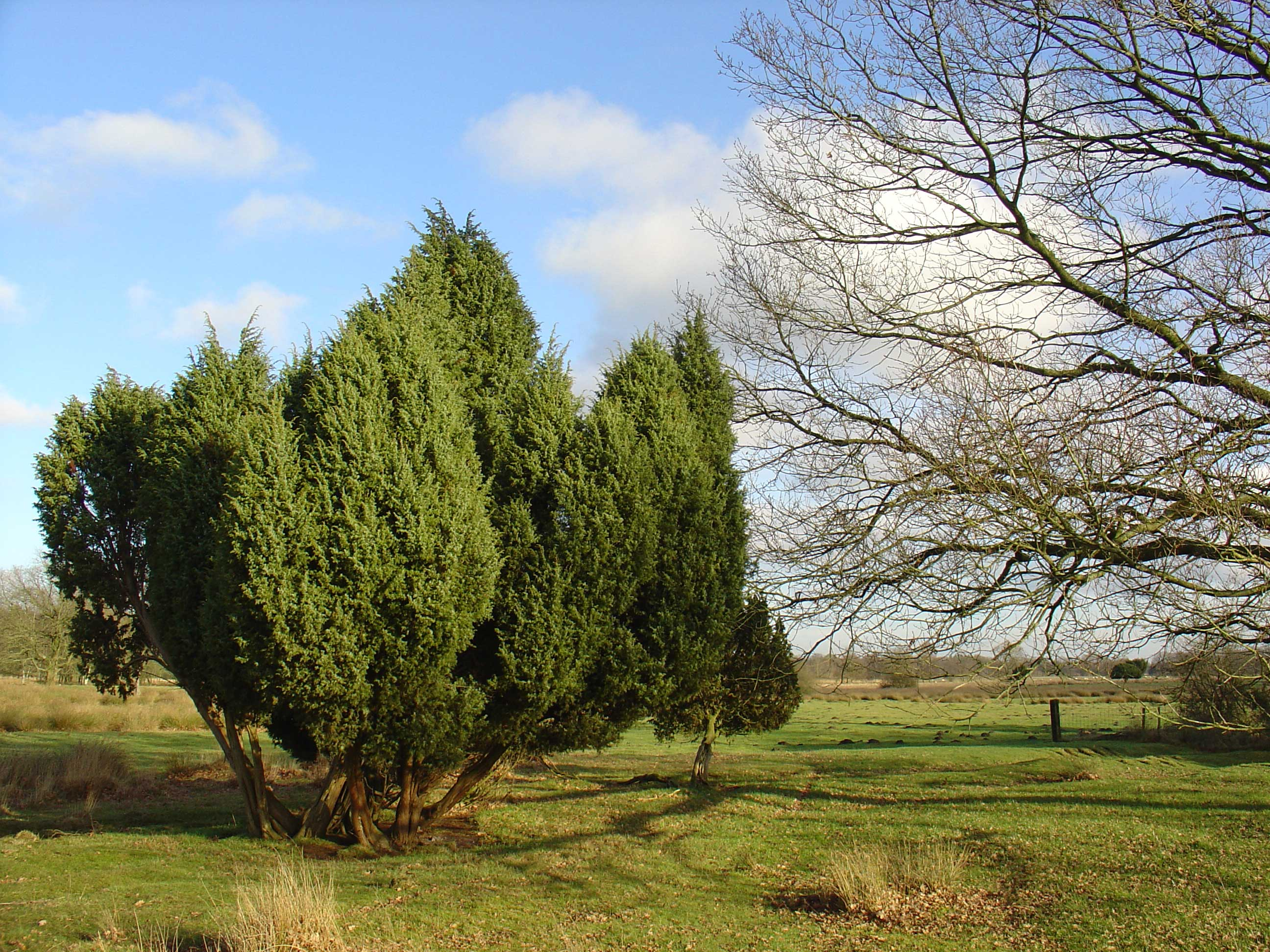 Dwingelderveld nabij het Smitsveen